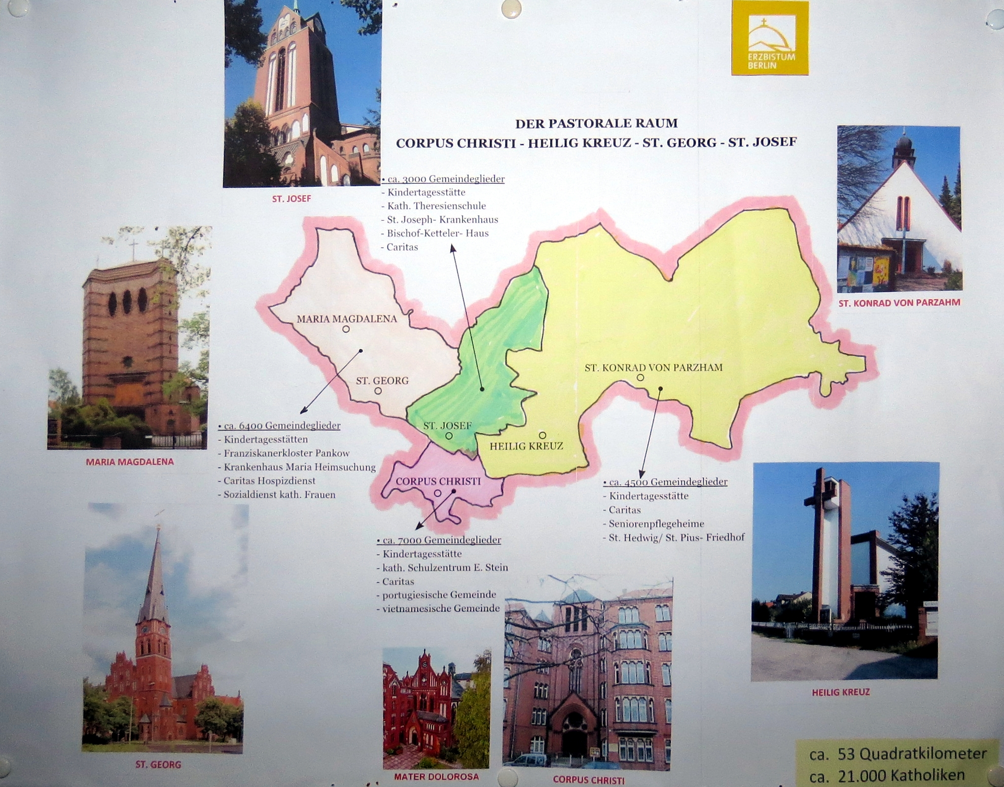 Kirche St. Georg, Berlin-Pankow, Infotafel zum Pastoralen Raum